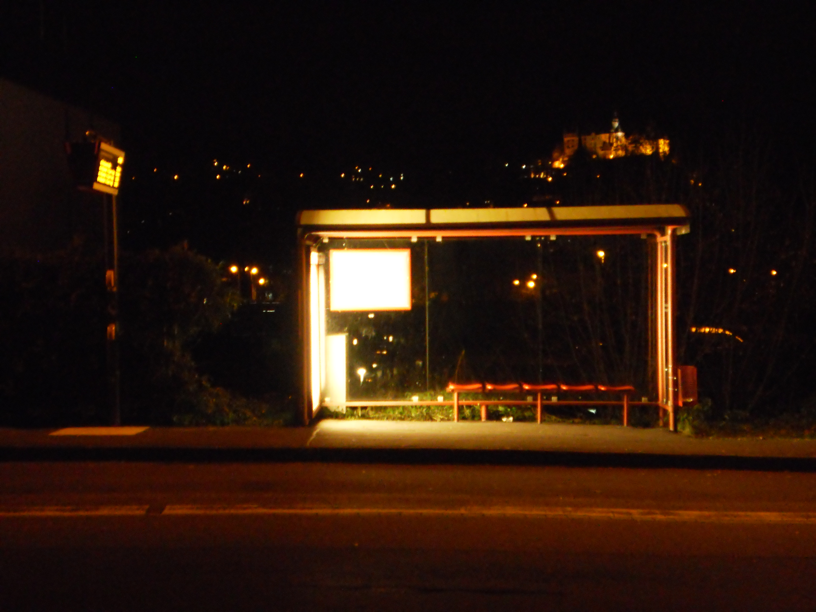 Bushaltestelle neben der Adolf-Reichwein-Schule (Berufsschule und Abendgymnasium) und für das Schwimmbad Aquamar an der Cappeler Strasse. Links neben der überdachten Haltestelle ist eine Anzeigetafel für die Fahrgastinformation zu sehen, und eine Information für Blinde und Sehbehinderte, wo mit einem Taster eine Ansage der nächsten abfahrenden Busse aufgerufen werden kann. Unten führt ein Aufmerksamkeitsfeld des in Marburg häufig eingesetzten Blindenleitsystems an den Taster an der Säule heran (siehe zweites Foto unten). Im Hintergrund das Marburger Schloss bei Nacht, jenseits der B3-Stadtautobahn.